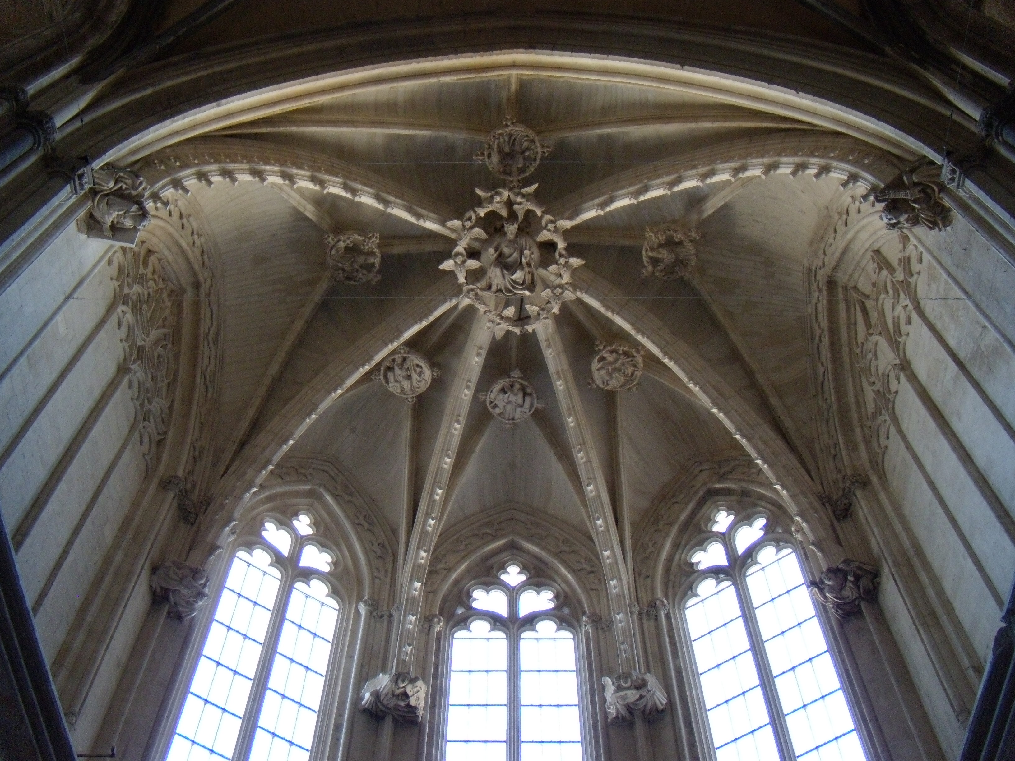 voûte du choeur